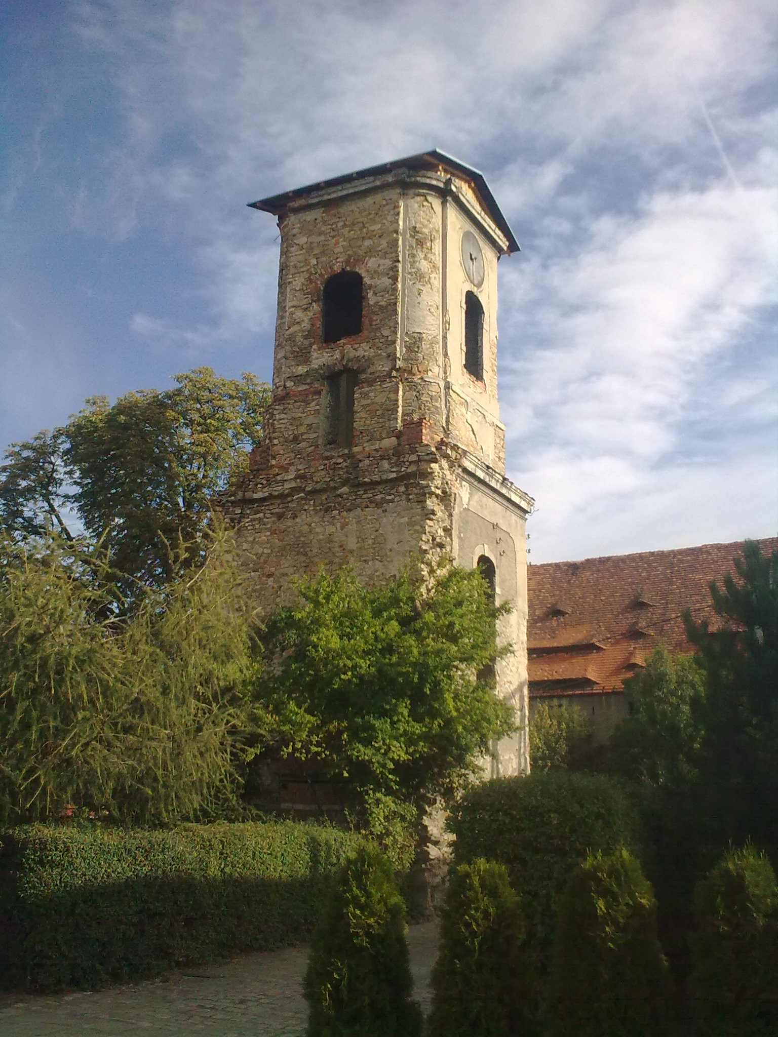 Mrowiny. Wieża kościola